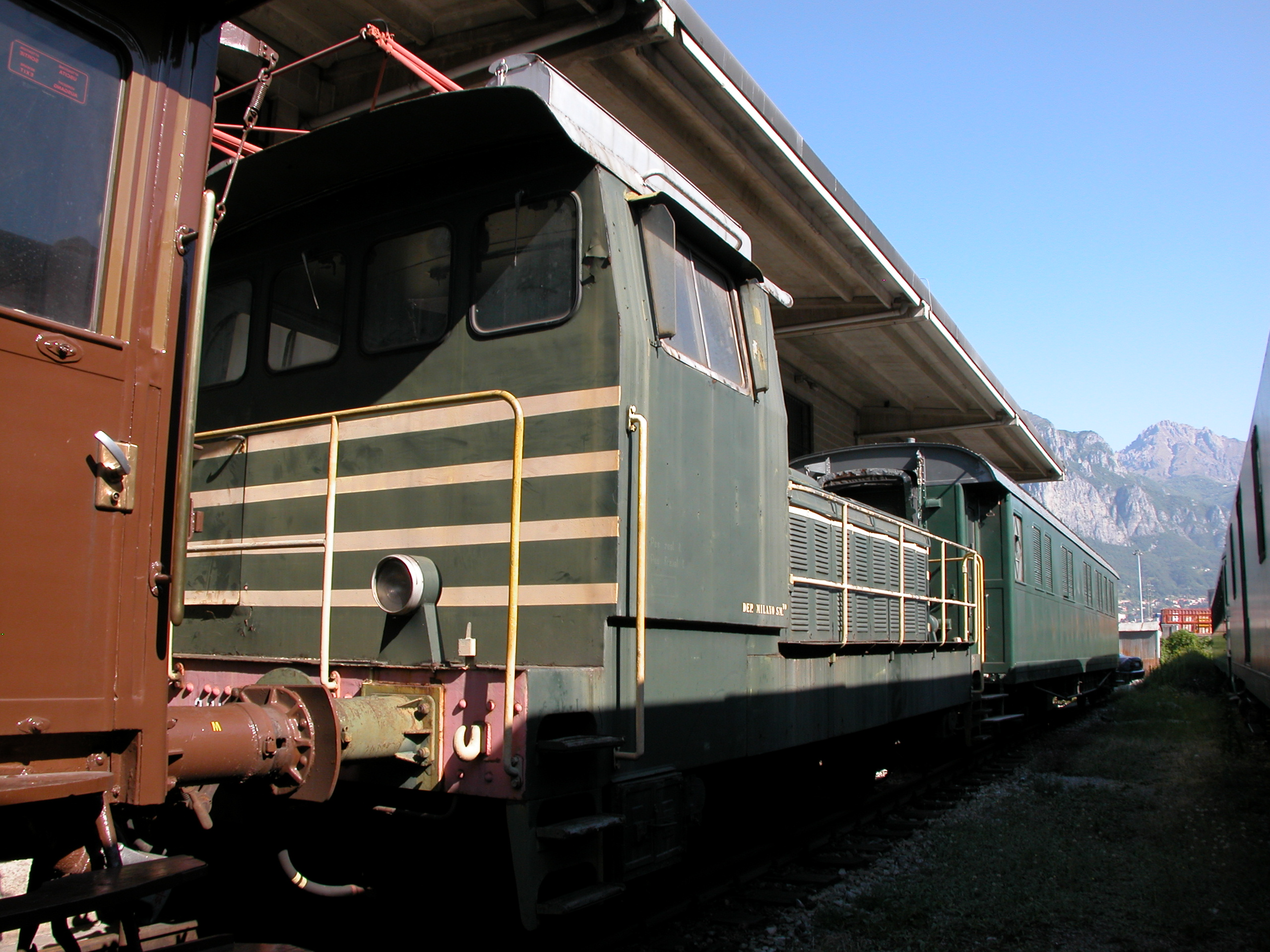 Locomotiva elettrica da manovra FS E.321.003 – Vista dal lato posteriore destro.